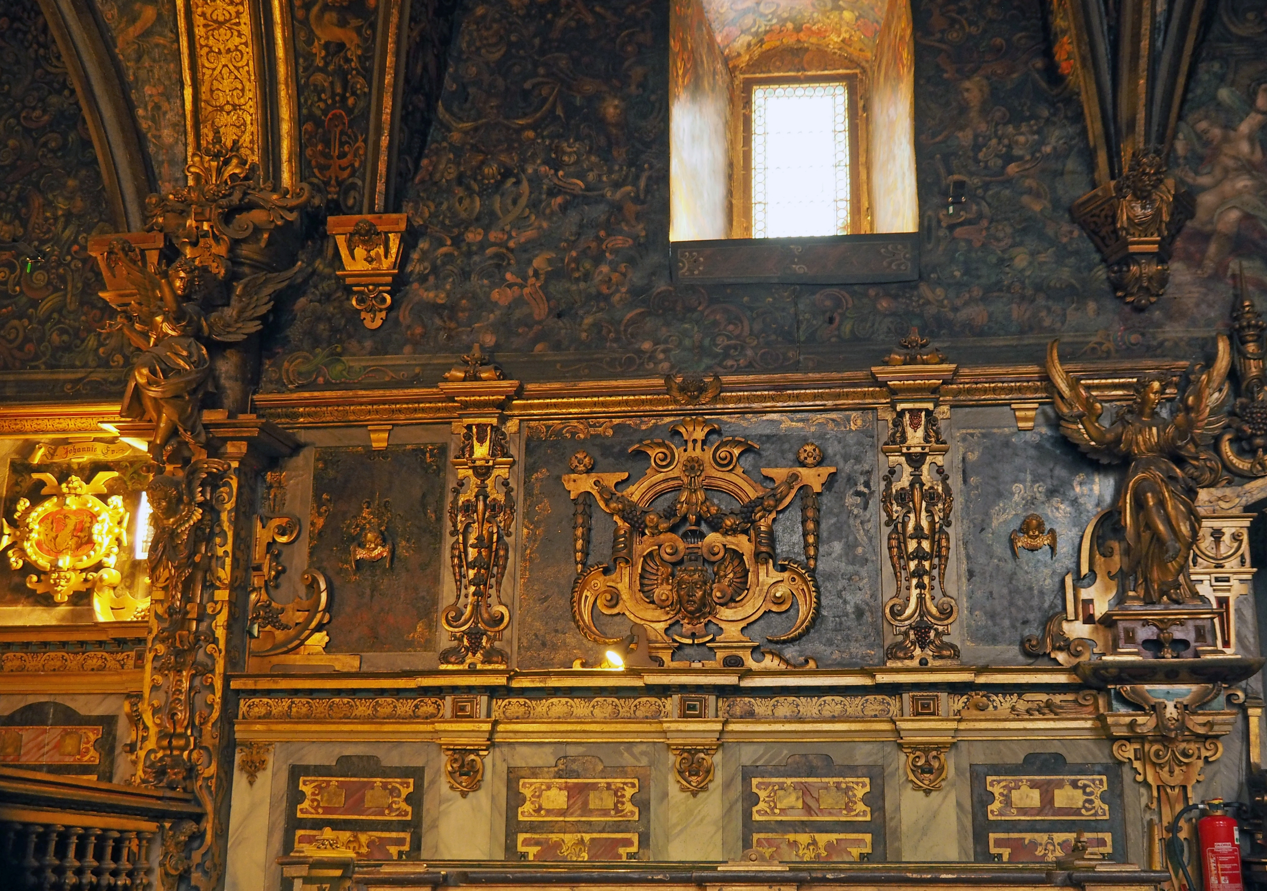 Innenraum der Schlosskapelle Bückeburg